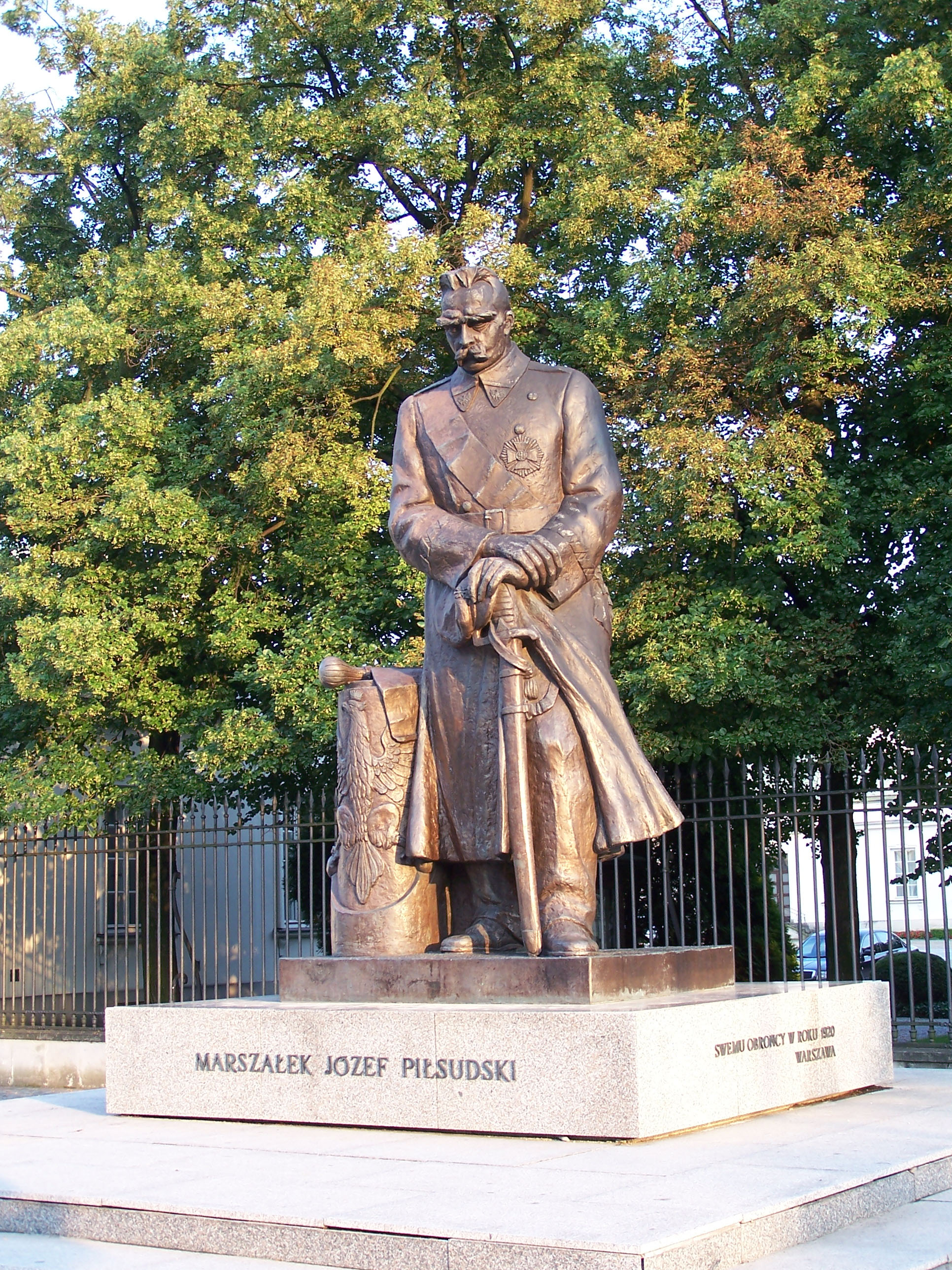 Józef Piłsudski Monument in Warsaw, Poland